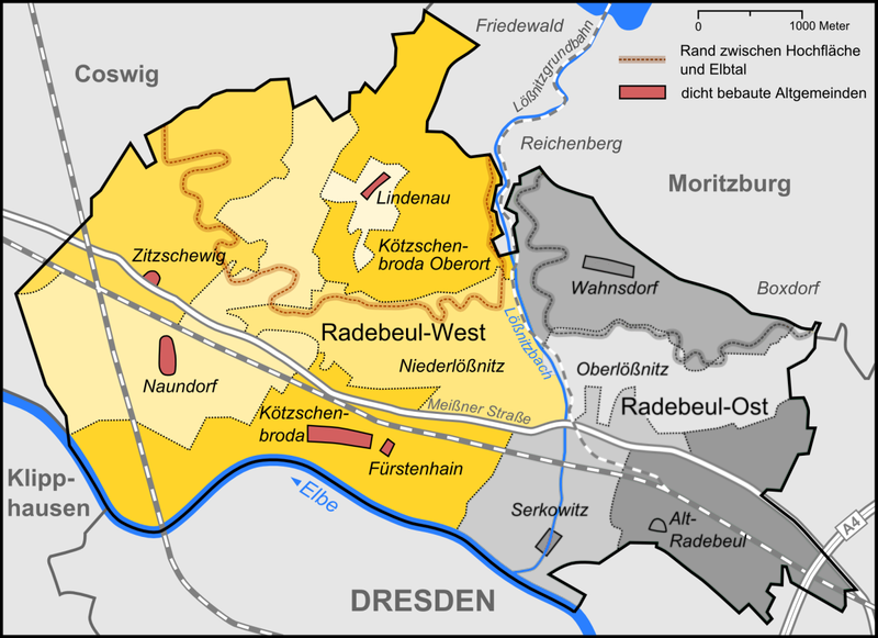 Karte der Stadtteile Radebeul-West